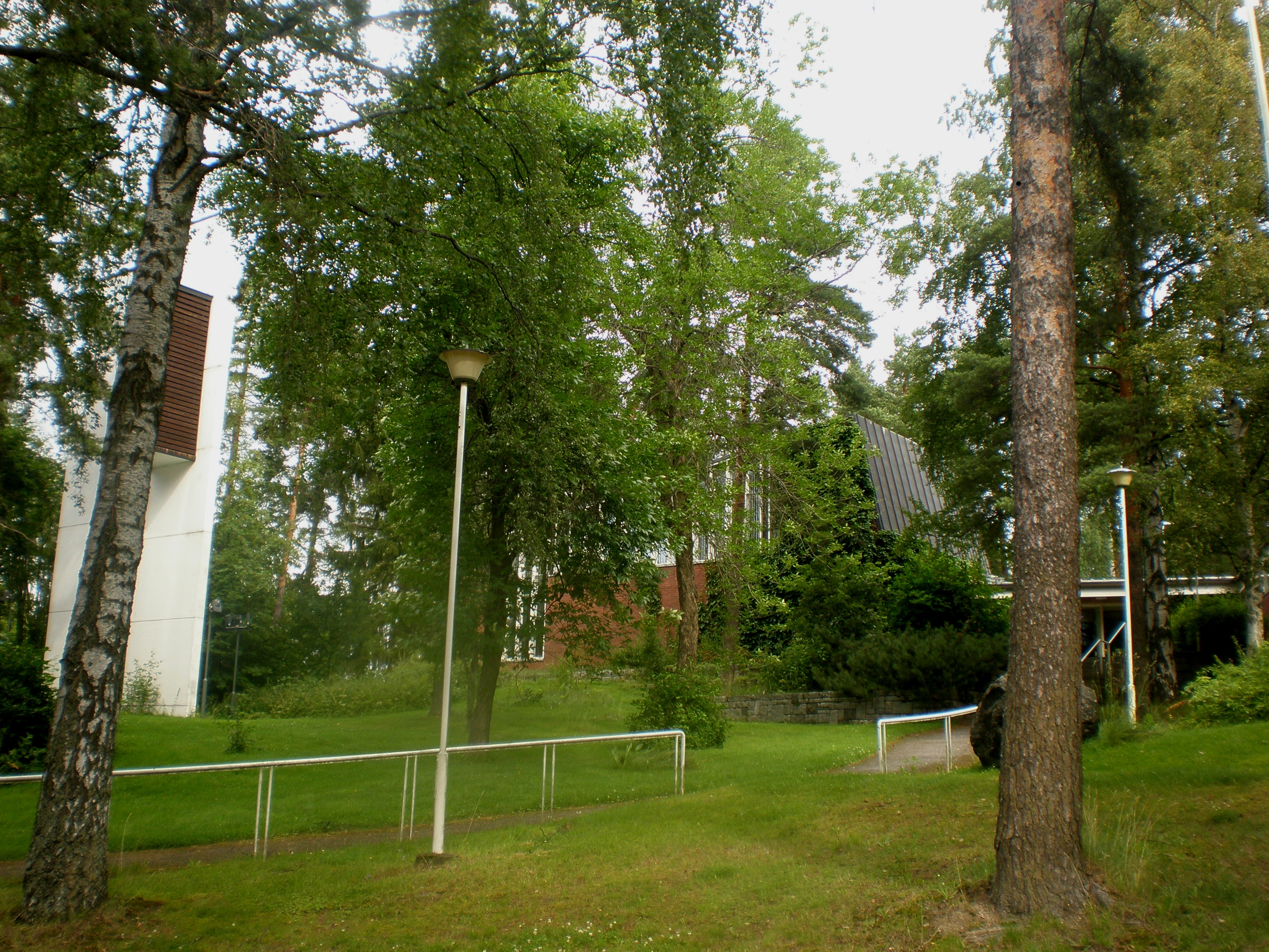 Lielahden kirkko